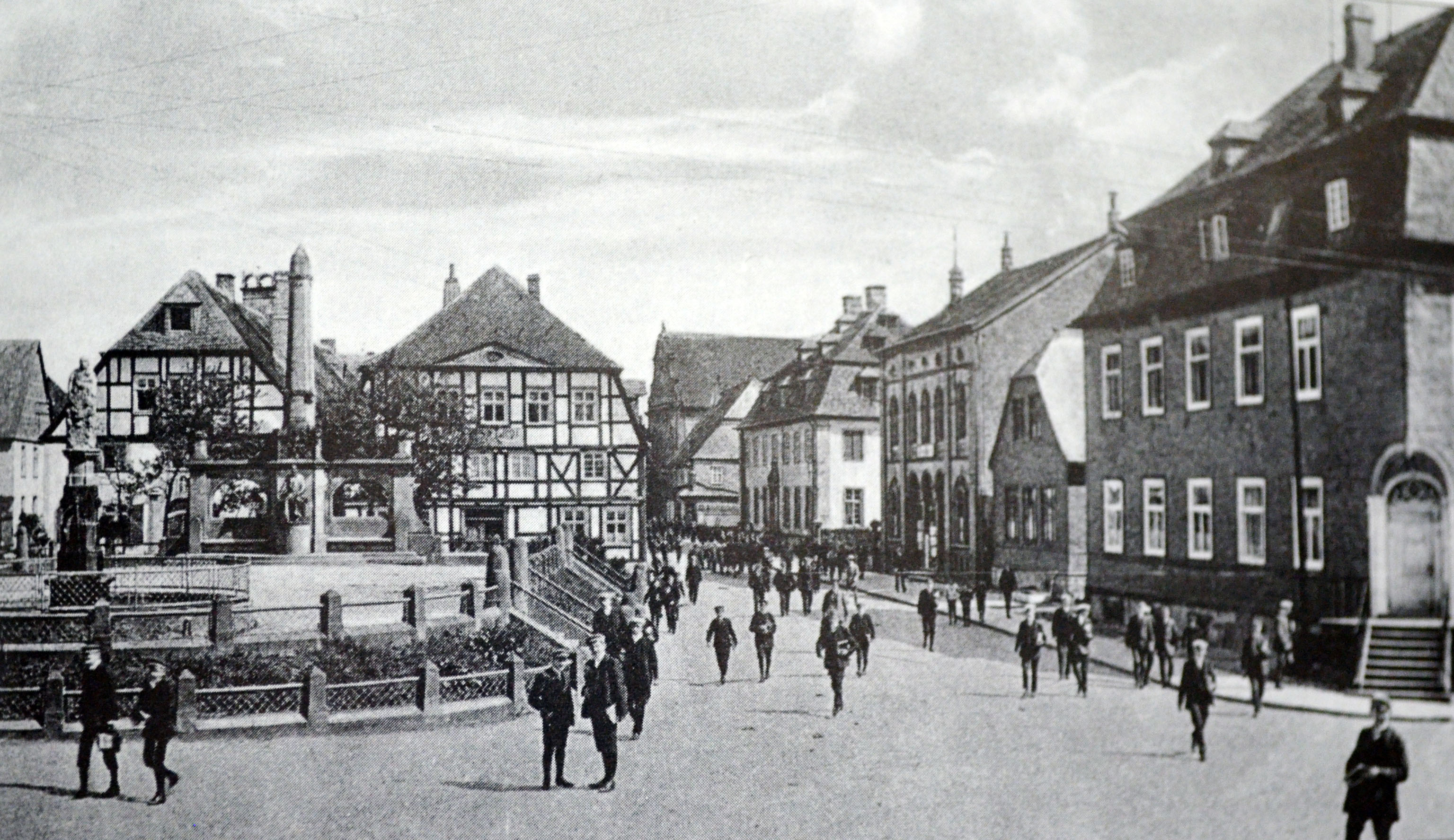 Pape-Denkmal in Brilon; erhöhtes Plateau auf dem alten Marktplatz